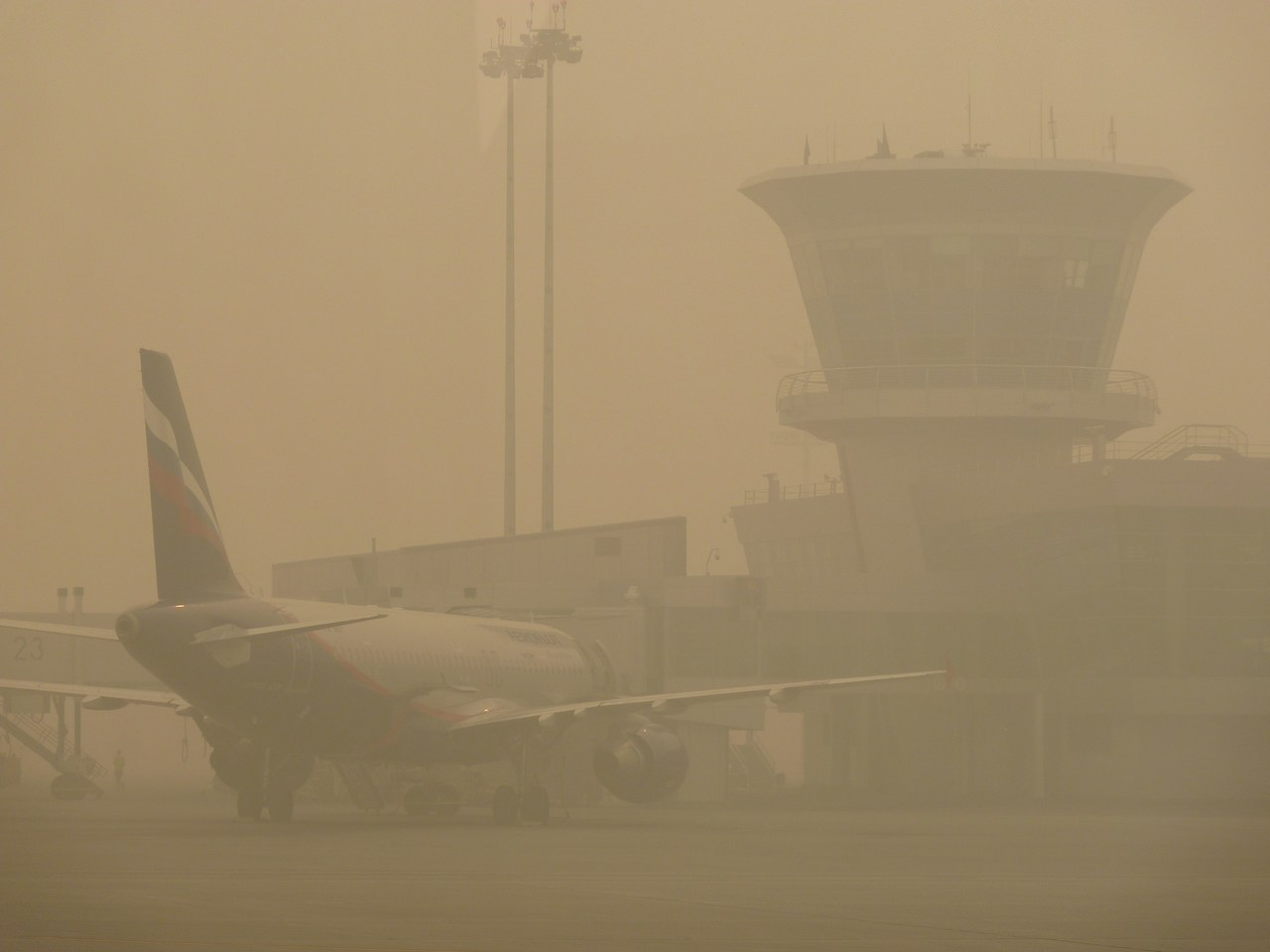 Fumée sur l'aéroport international Cheremetievo suite aux incendies de forêt qui ont ravagés la Russie en 2010.